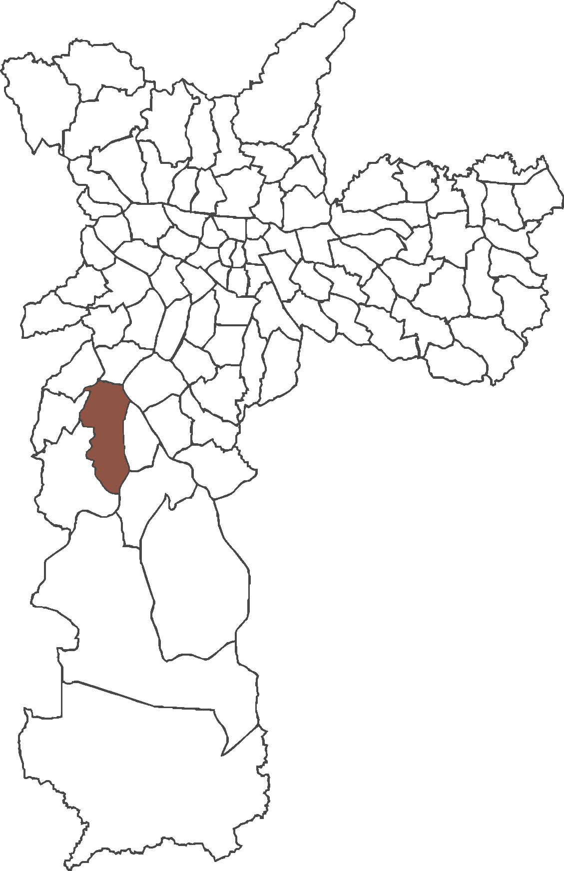 Localização do distrito de Jardim São Luís no município de São Paulo.